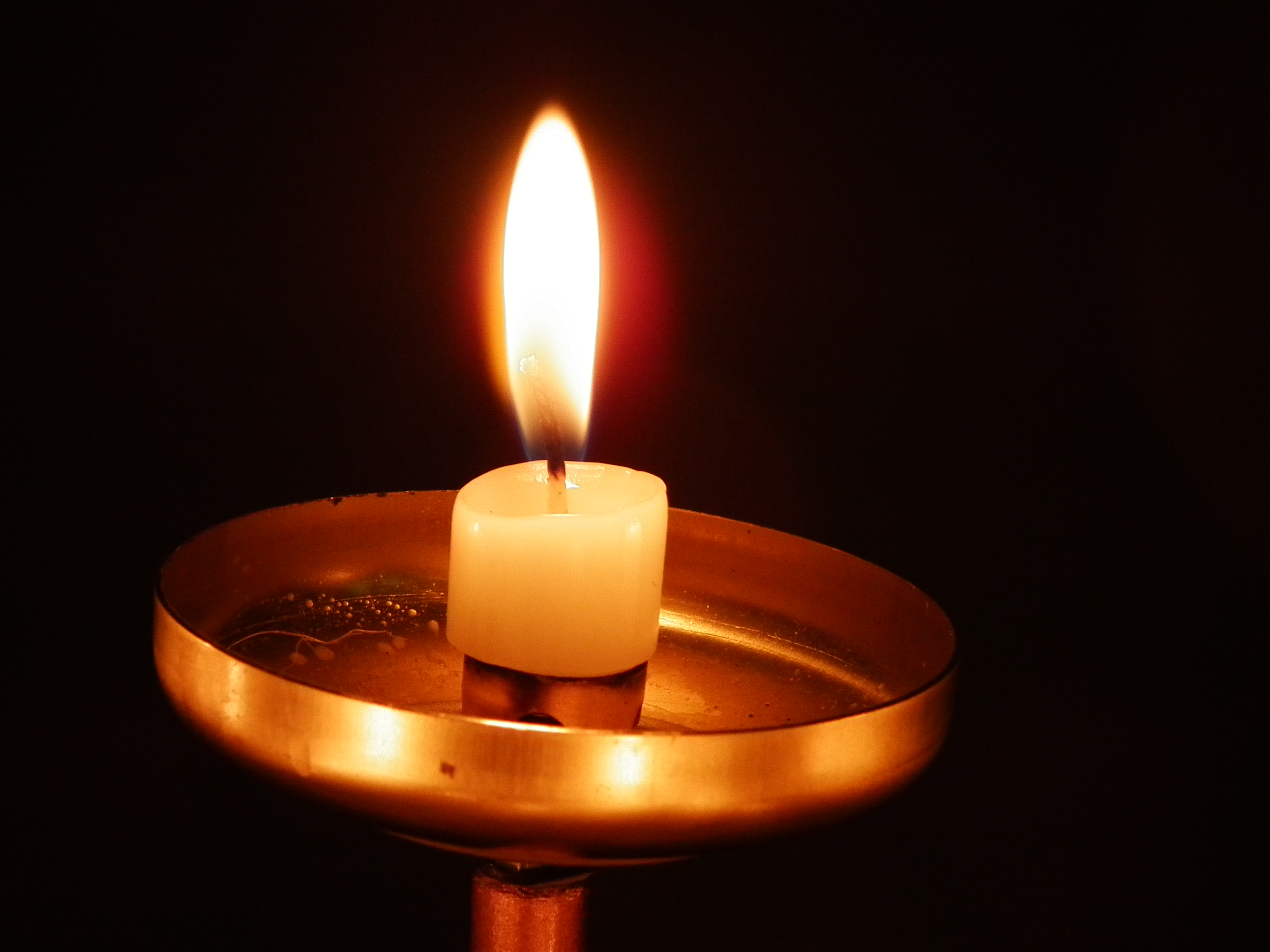 Einzelne brennende Opferkerze